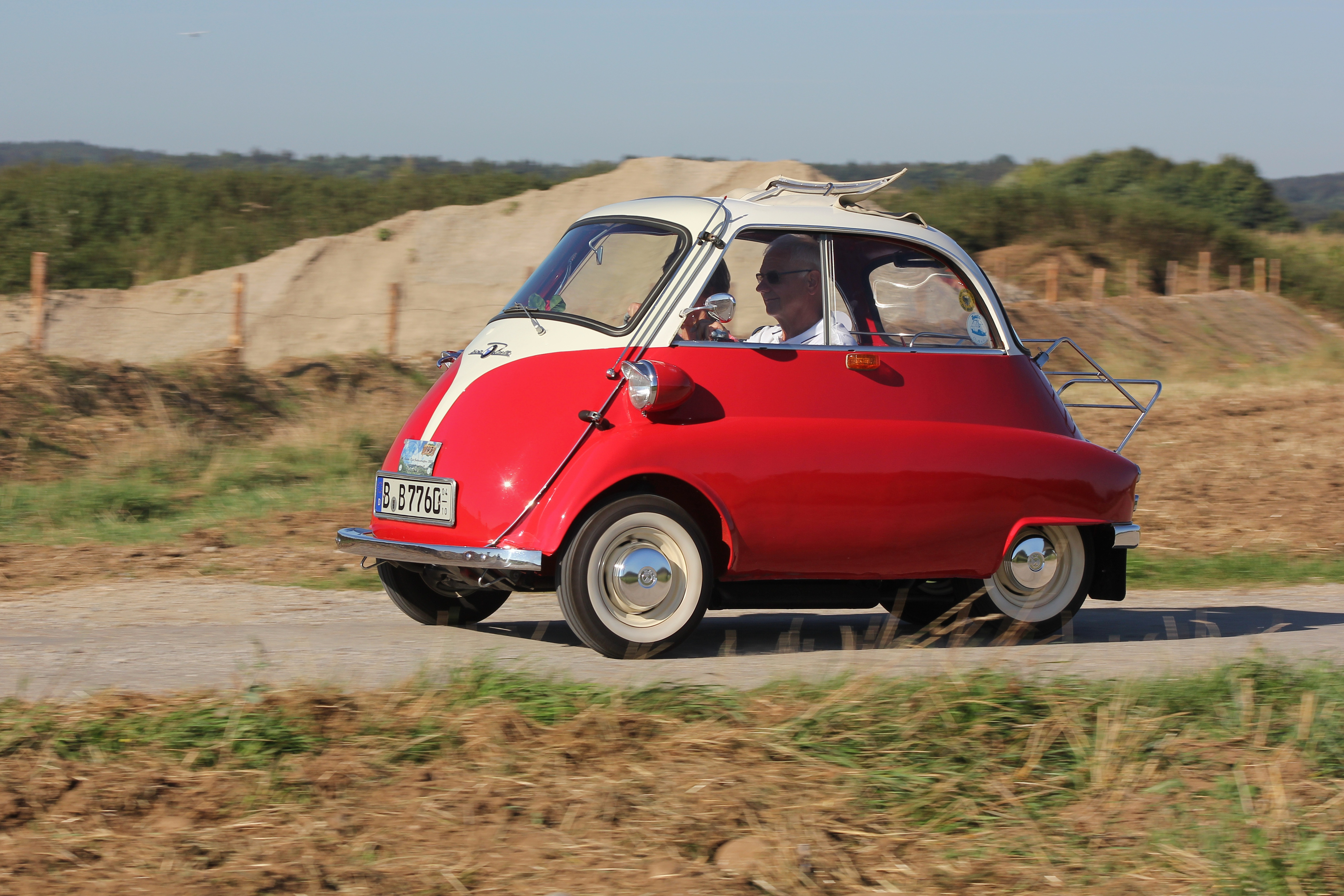 BMW Isetta (Ausführung 1959 bis 1962) bei der Ausfahrt des Isetta-Treffens in Bad Wörishofen (Kennzeichen des Fahrzeugs verändert)